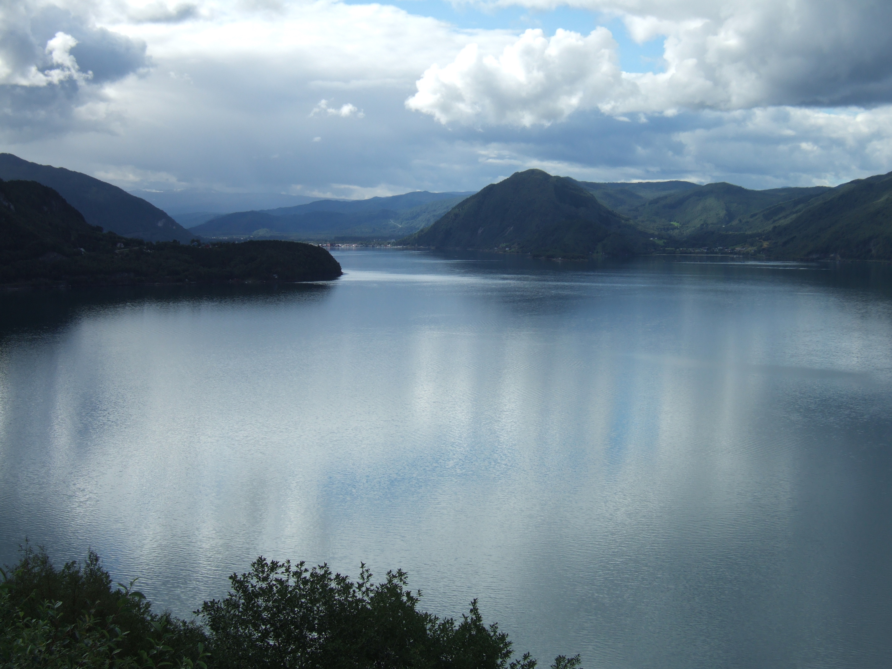 Saltdalsfjorden og Rognan sett fra Saltdalsfjordens østside ved europavei 6. Tettstedet Rognan er administrasjonsstedet for Saltdal kommune i Nordland.